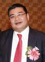 彭熾輝 Hong Kong expert of logistics